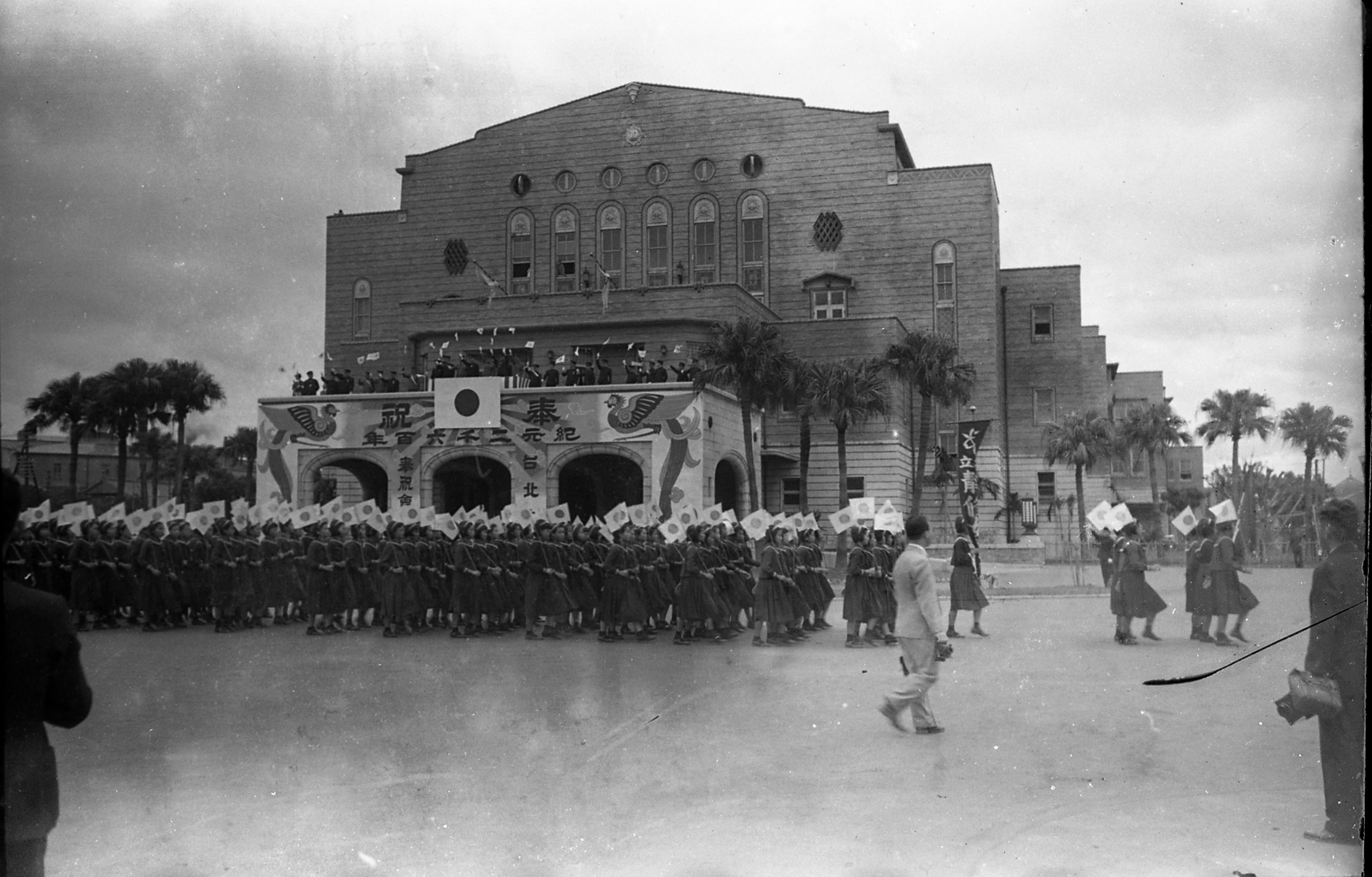 日本皇紀二千六百年慶祝遊行，臺北公會堂前。